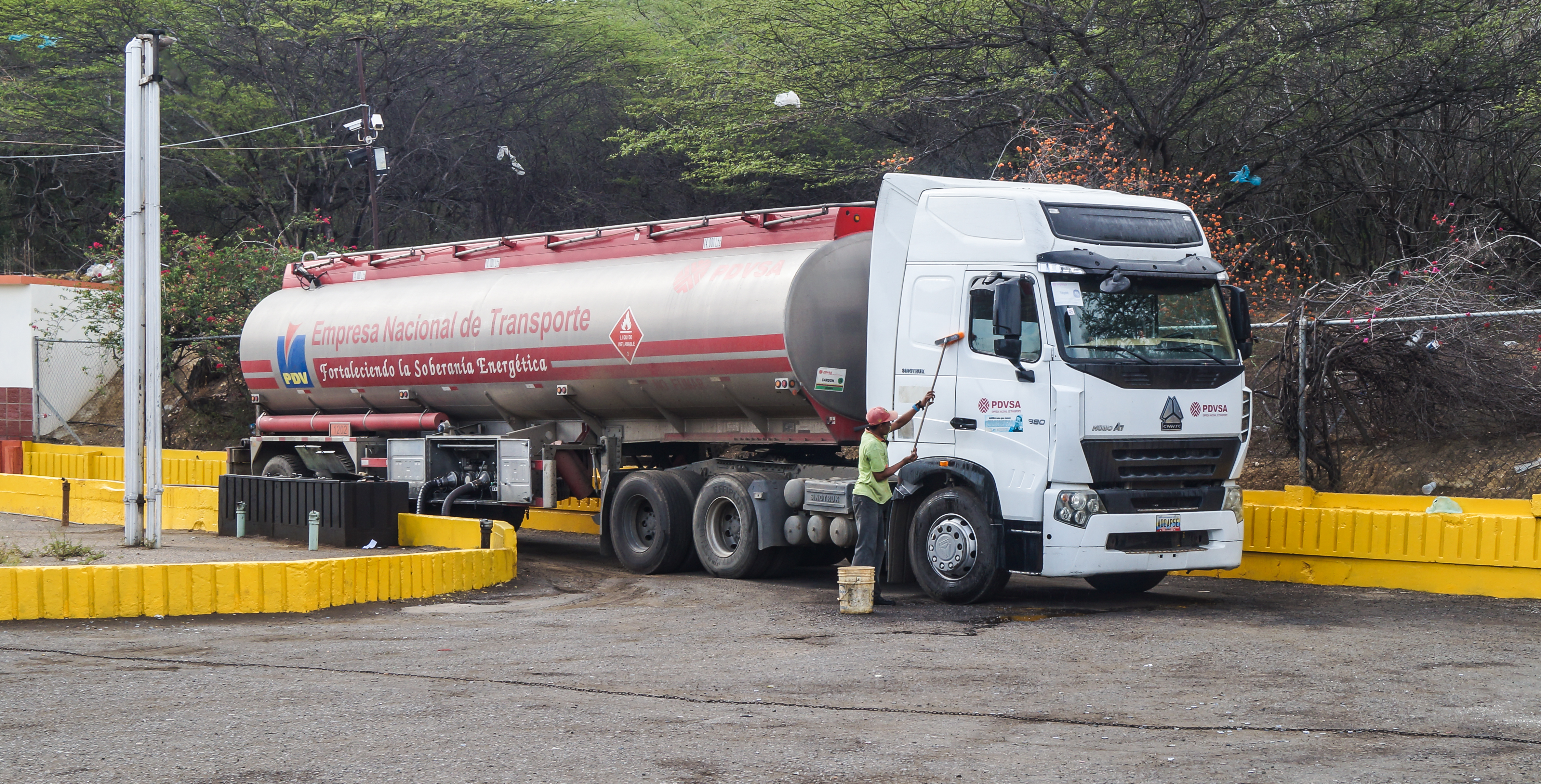 Transporte de combustible. Venezuela.